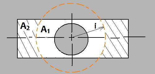 Trägheitsradius eines beliebigen Querschnitts mit zentraler Rotationsachse